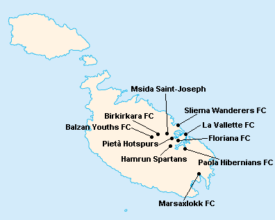 Répartition des clubs de Premier League Maltaise 2003-2004.